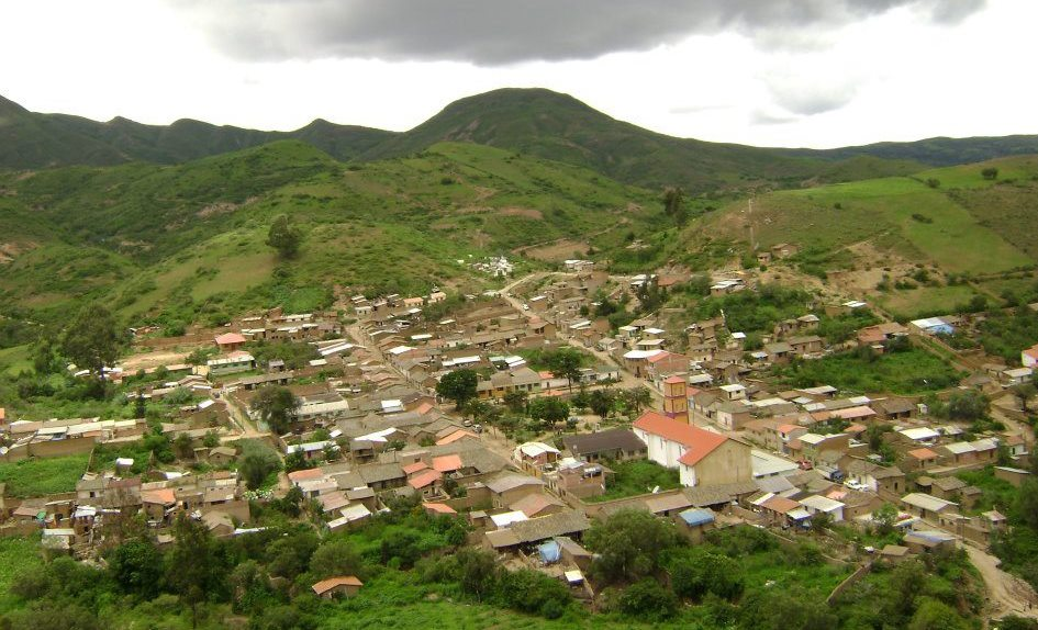 Vista de Moro Moro